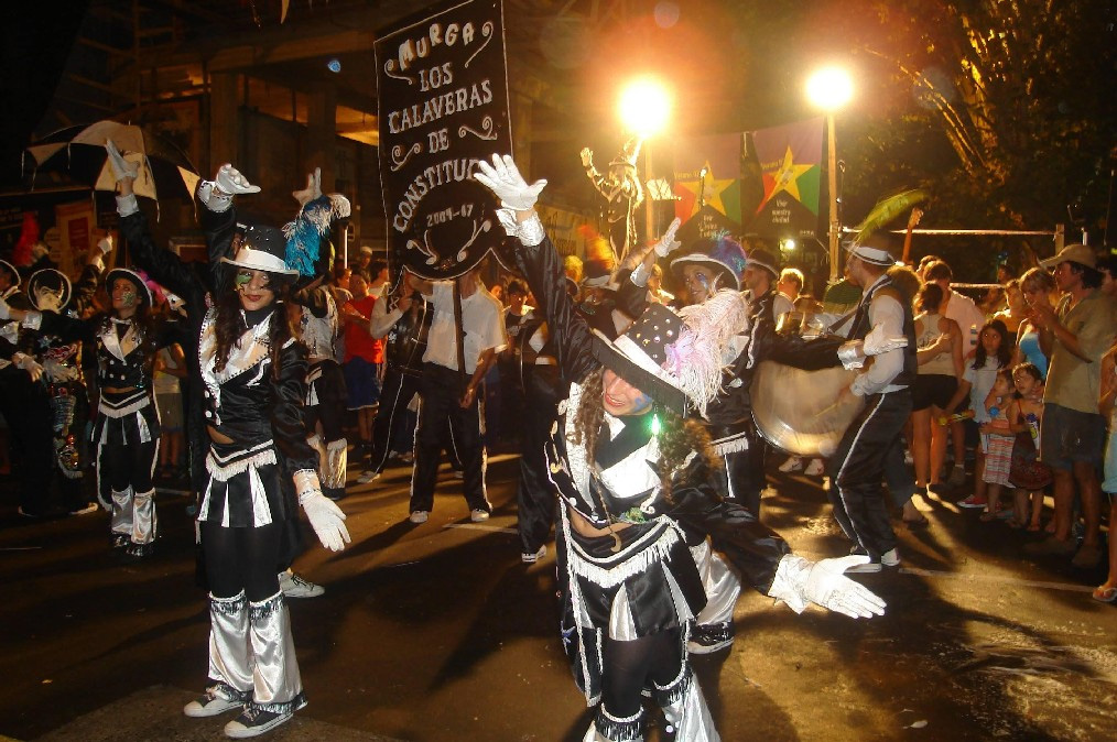 Murga porteña